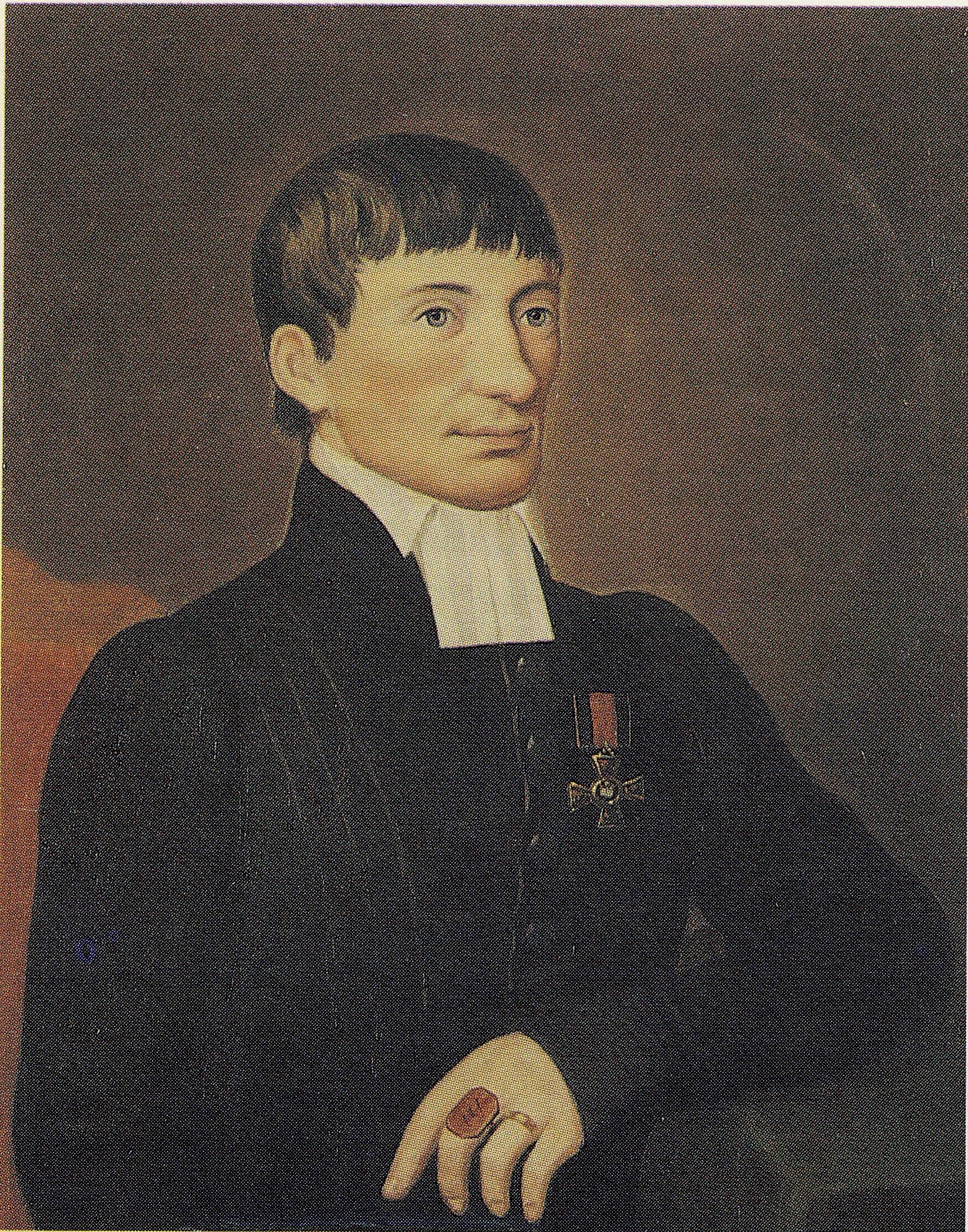 Teologian professori Anders Johan Lagus (1775-1831), tuntemattoman taiteilijan maalaus yksityisessä kokoelmassa.